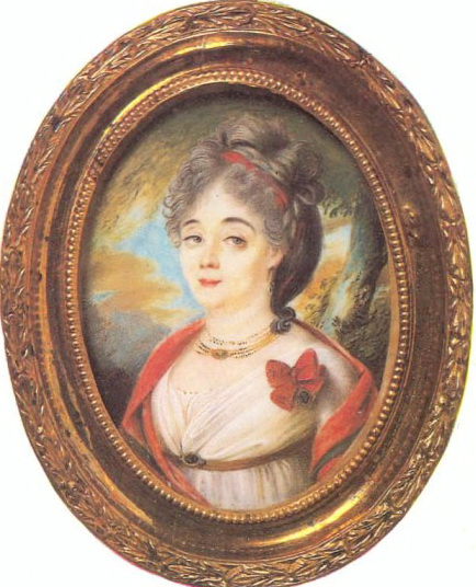 Портрет А.А. Обольяниновой. Россия. Начало XIX в. Кость. Оружейная палата Московского Кремля.